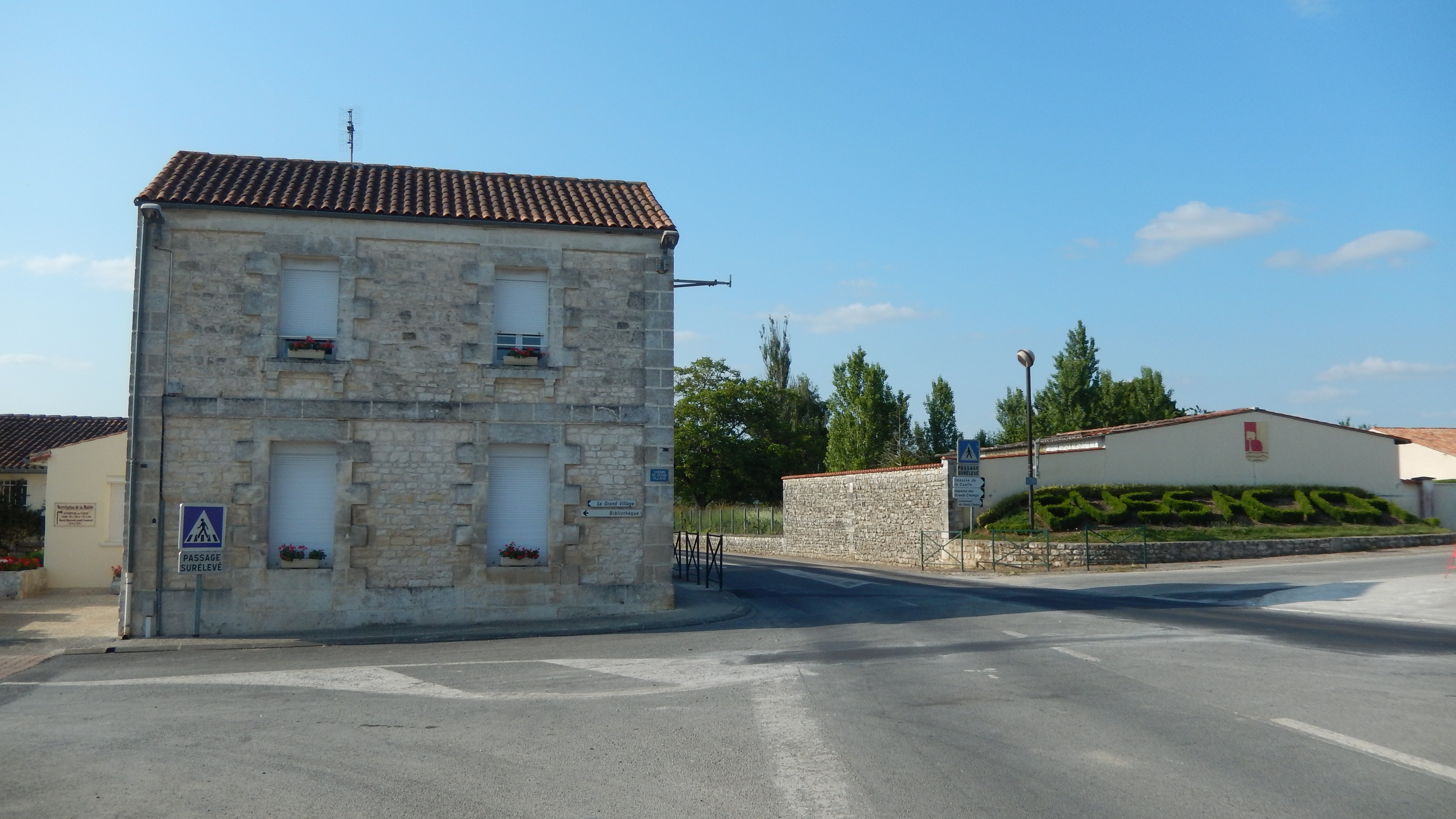 La mairie de Bussac-sur-Charente, commune française de Charente-Maritime, traversée par la route départementale 114.